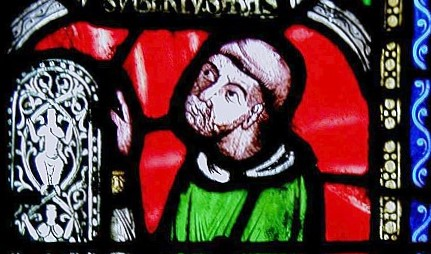 Vitrail réputé représenter l'abbé Suger